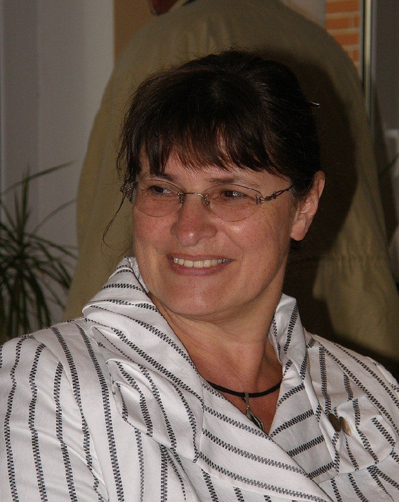 Magrit Wetzel